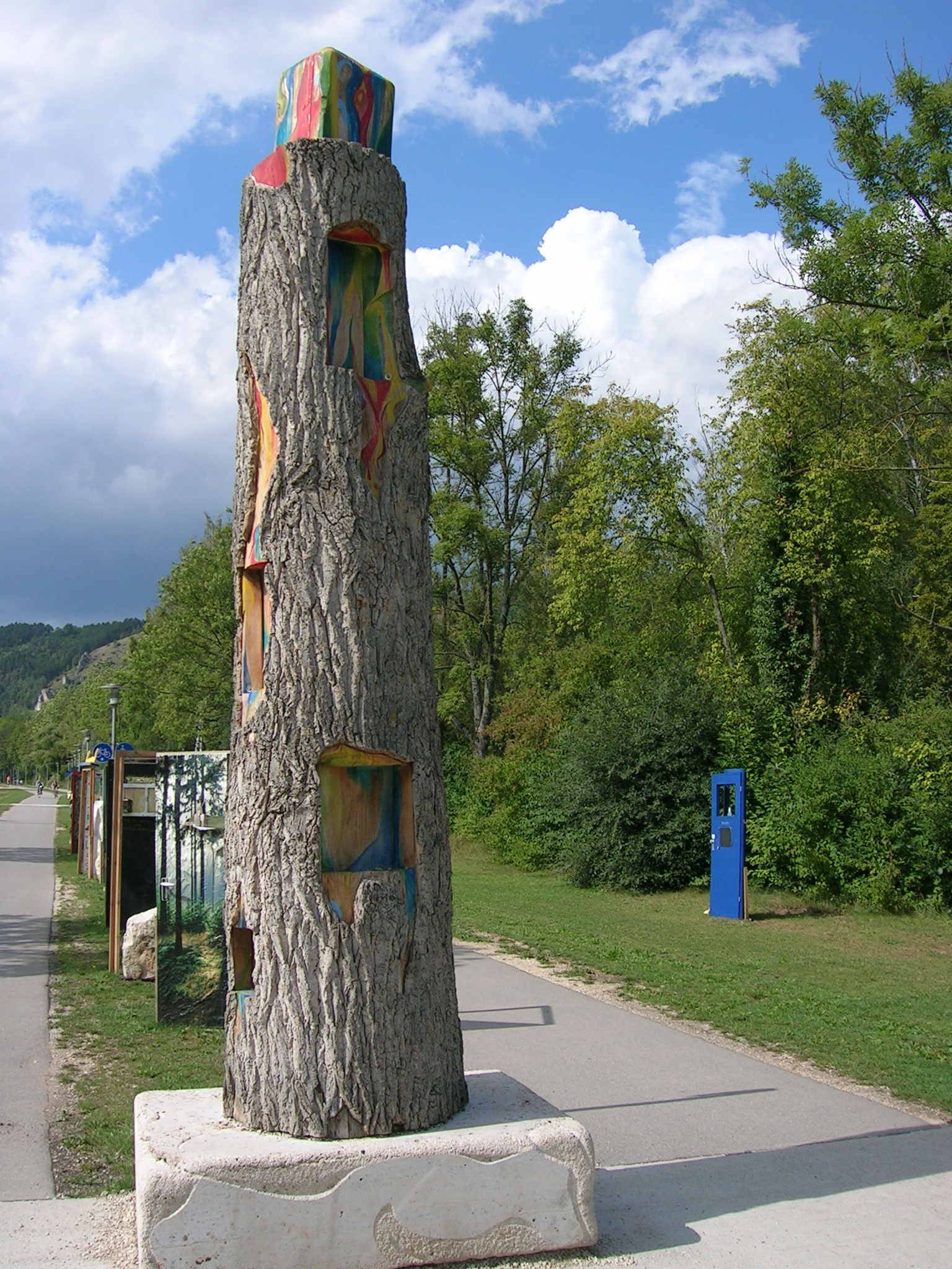 Kunstausstellung "Open HeArt" 2010 in Eichstätt: "La Vista Nel Dentro II" von Ariana Keßler am Altmühltalradweg.